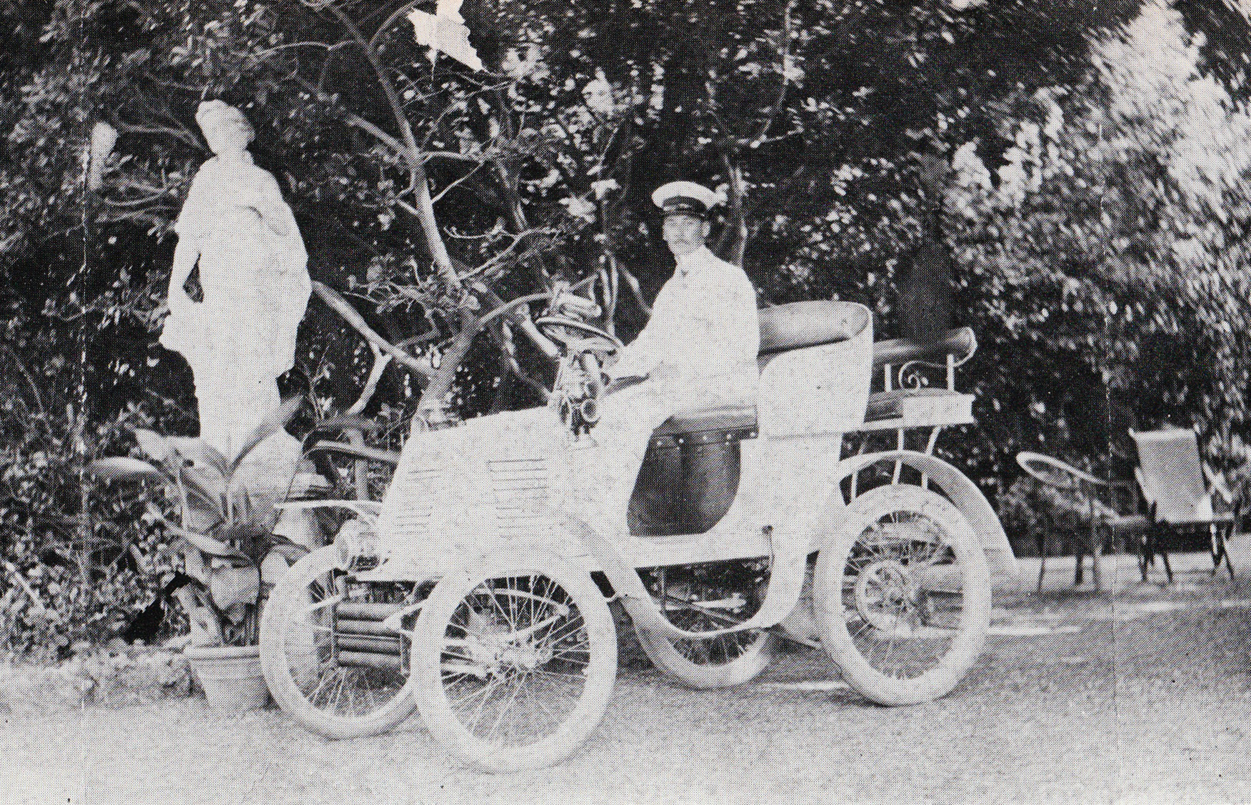 Automobile Florentia, 1901